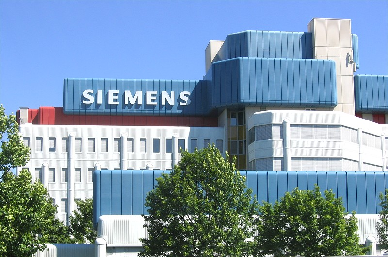 Siemens München-Perlach